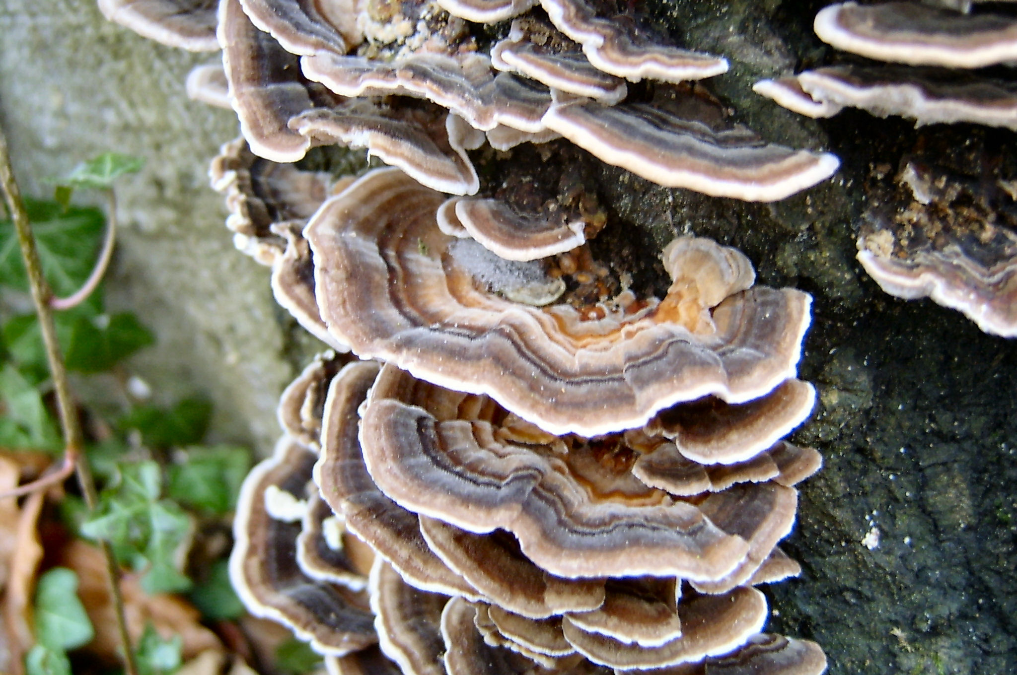 Trametes versicolor at Puszcza Notecka - gmina Santok, powiat gorzowski, woj. lubuskie, Poland